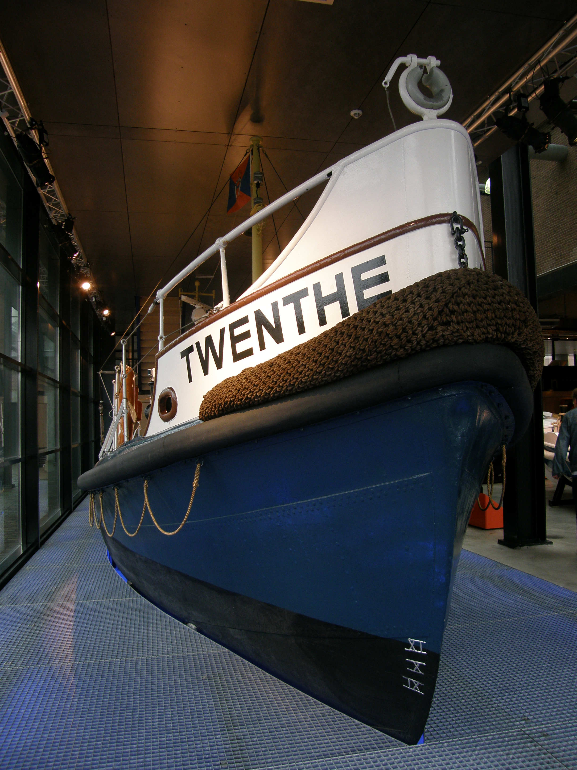 Nationaal Reddingmuseum Dorus Rijkers in Den Helder